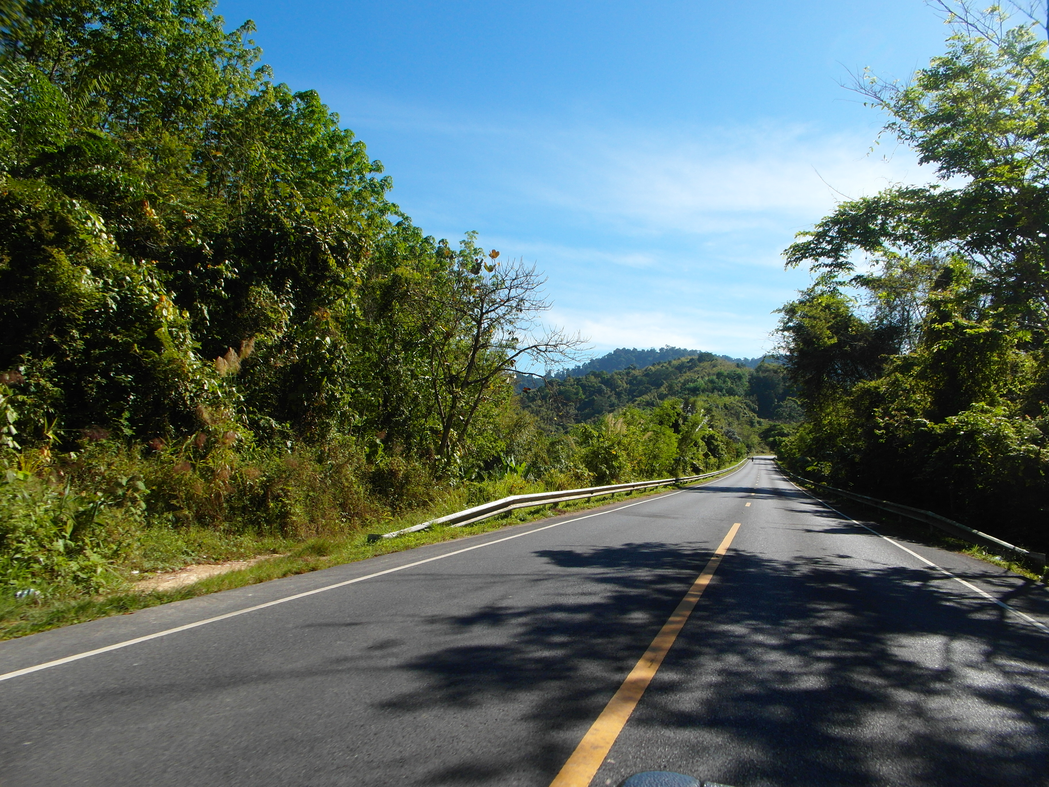 Khao Sok (Кхао Сок март 2013)